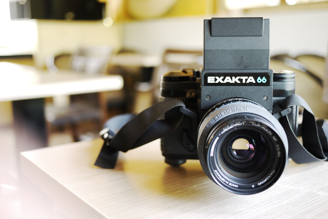 Eine Exakta 66 Kamera mit aufgeklapptem Lichtschachtsucher